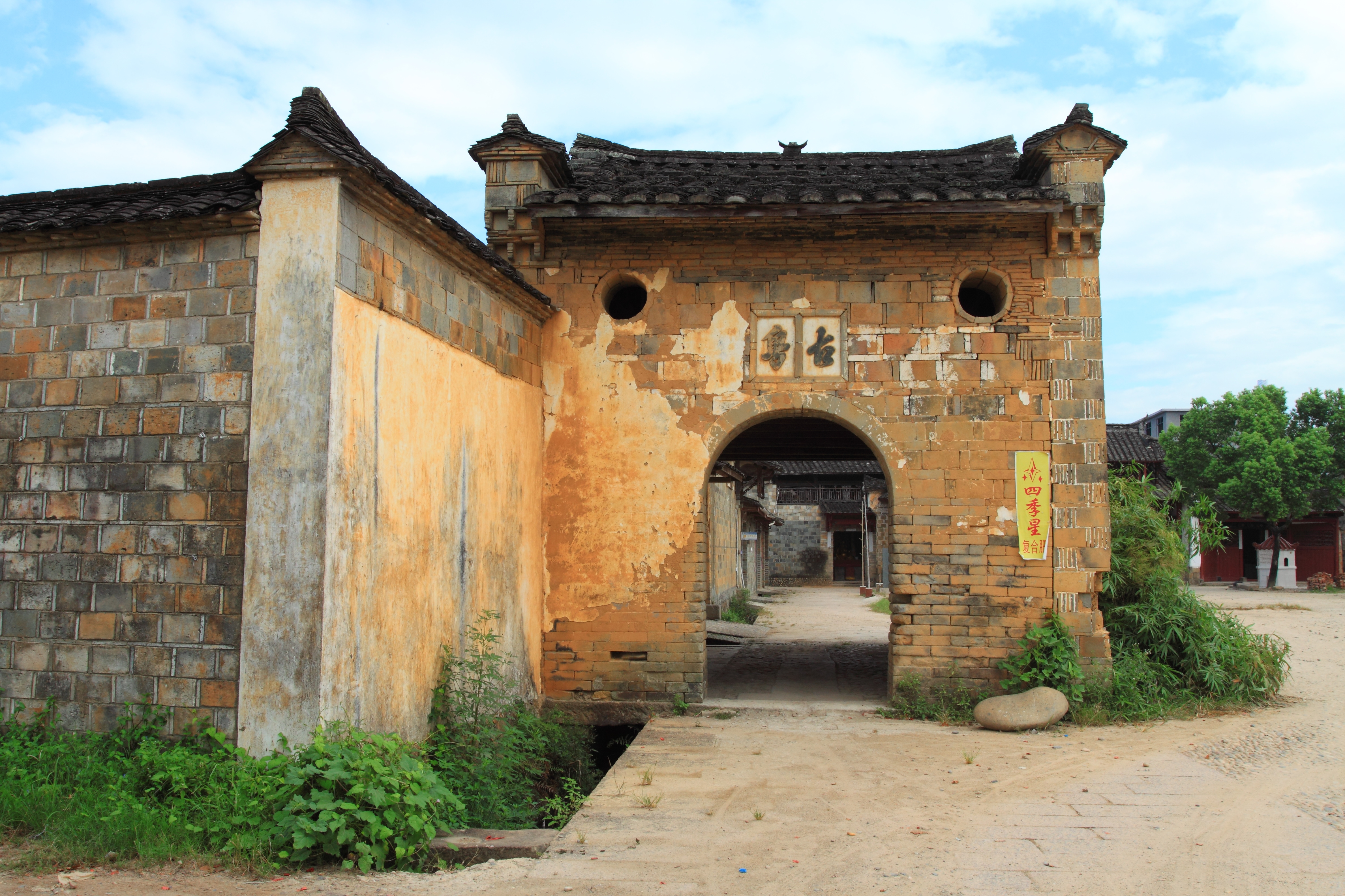 古粤门楼